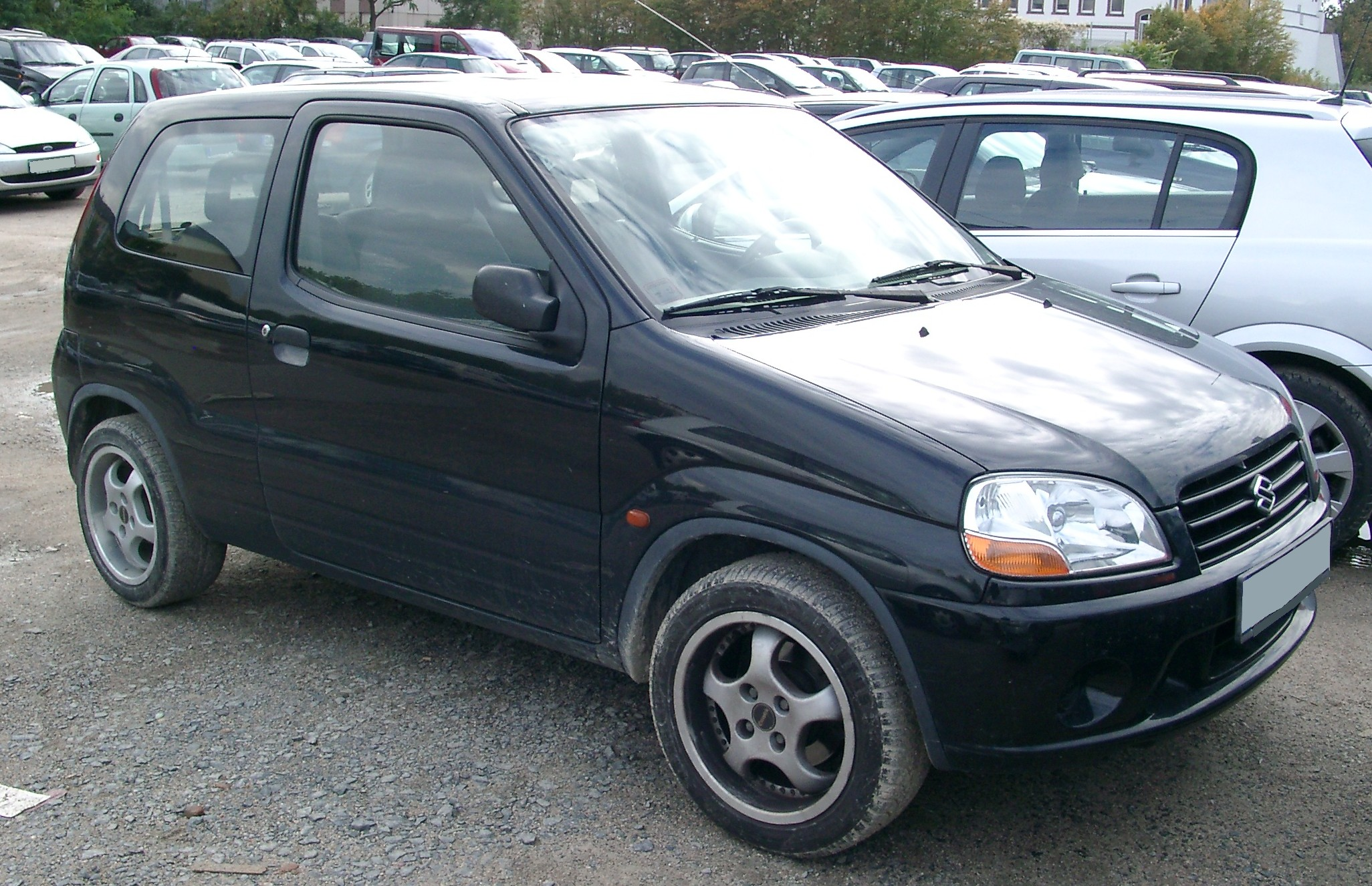 Suzuki Ignis